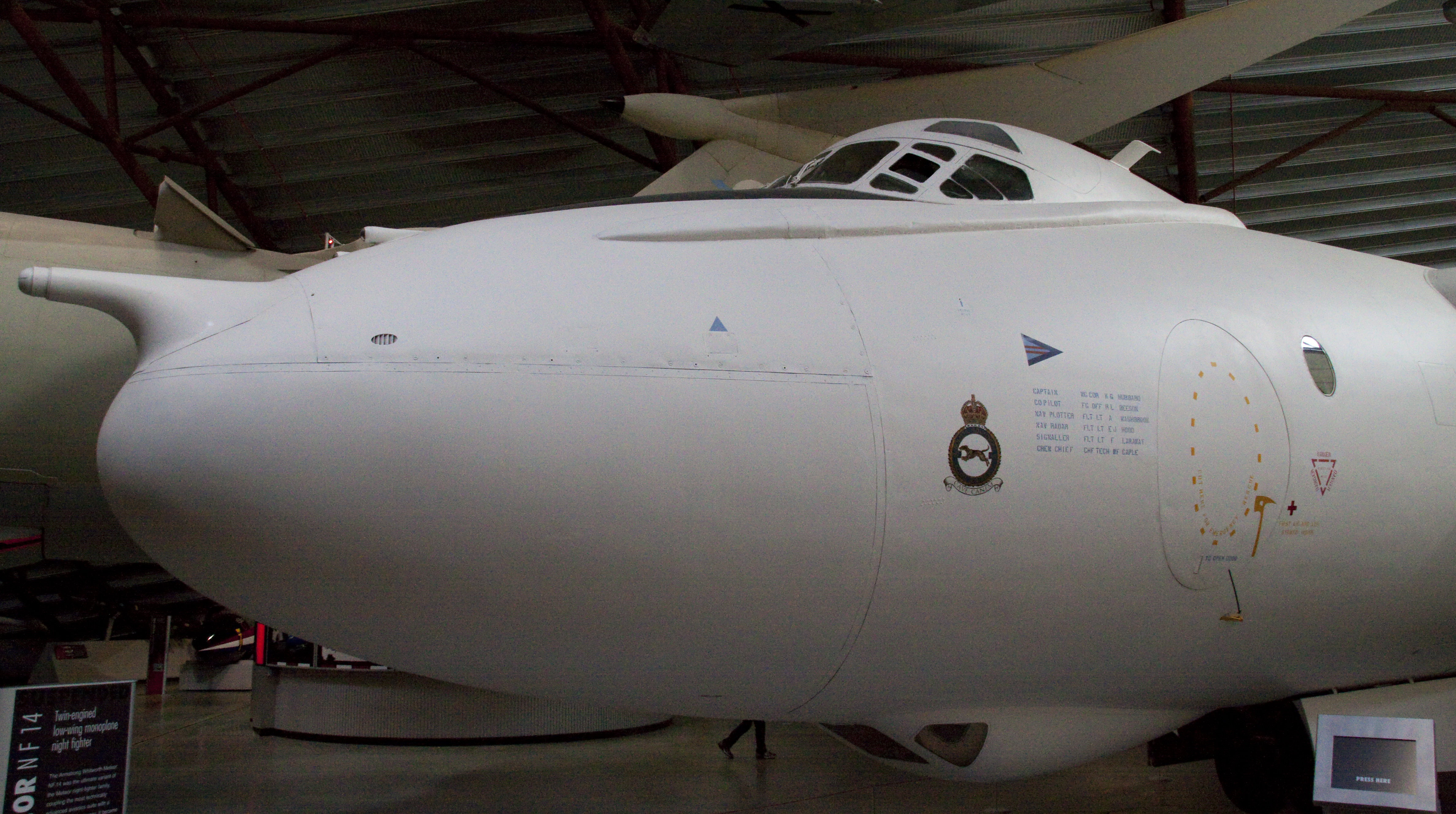 Valiant 1